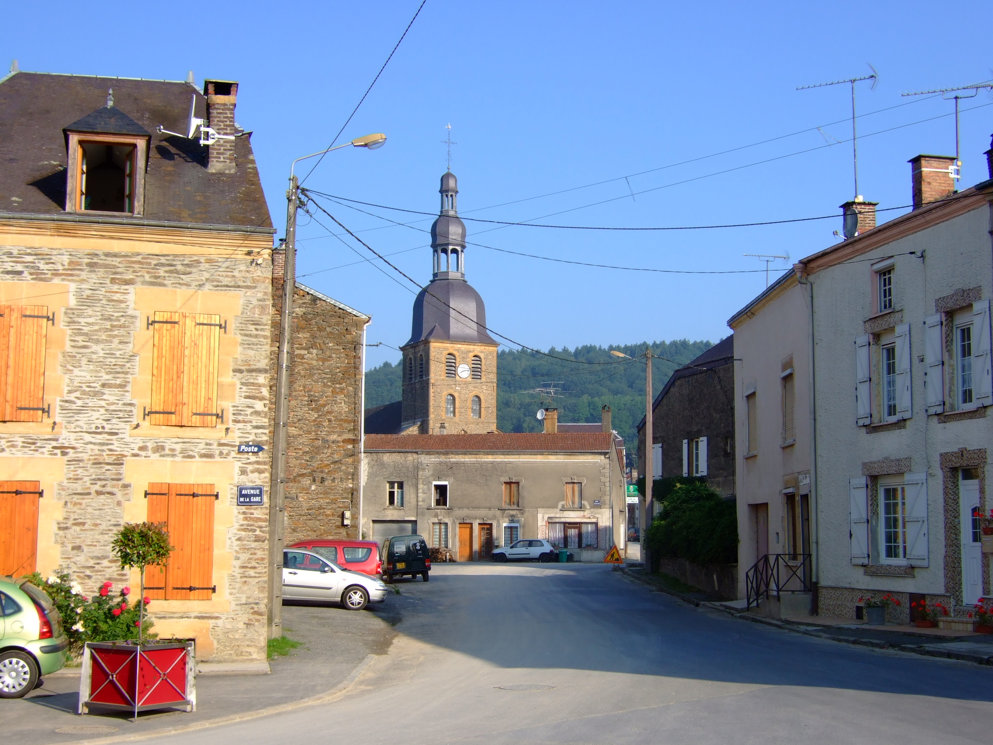 Le centre du village à Gespunsart